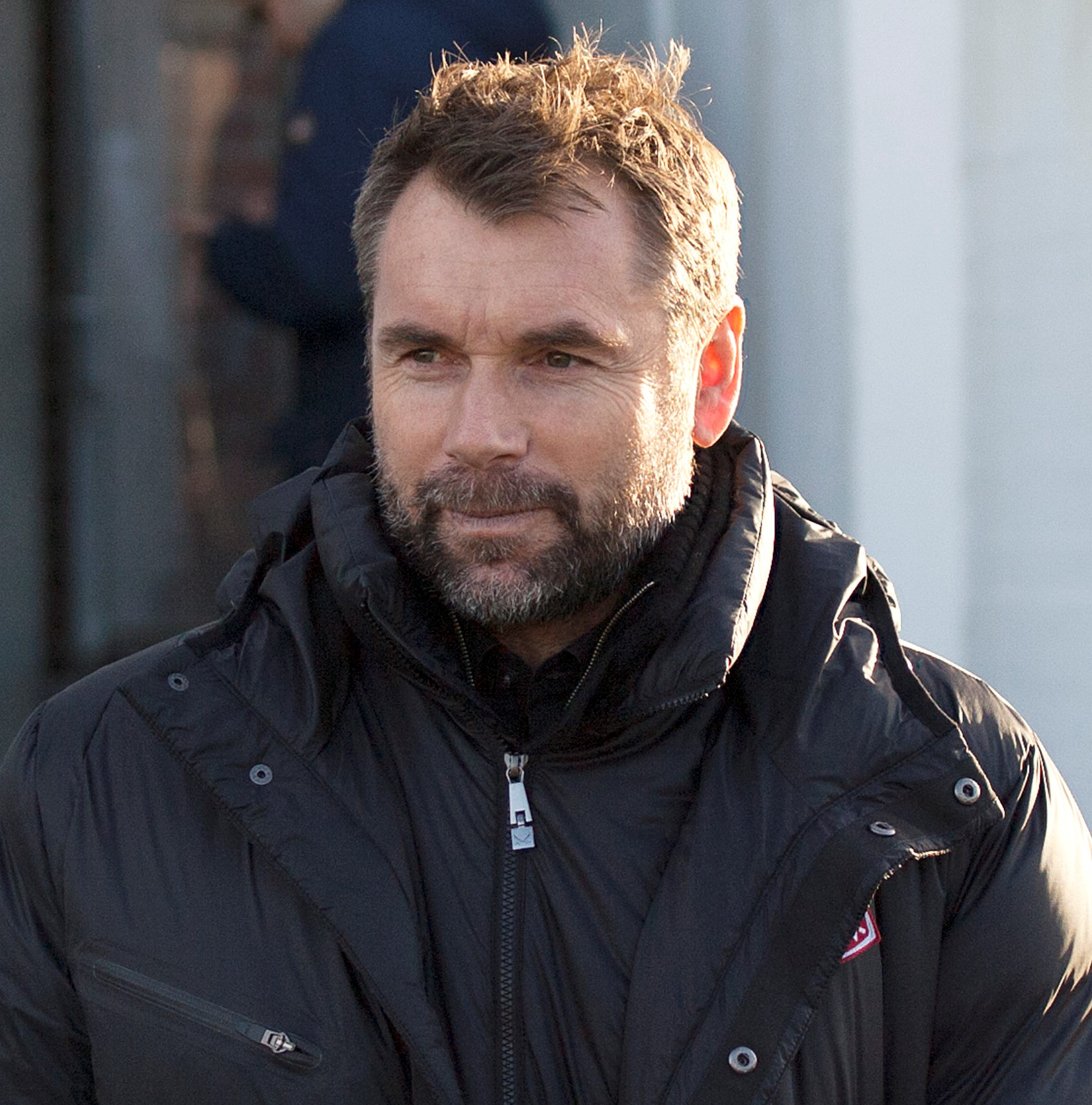 Bernd Hollerbach (2015)